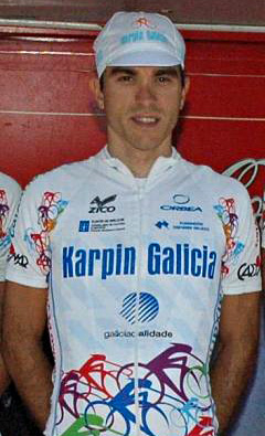 Iban Mayoz. Karpin-Galicia, Euskal Bizikleta 2008